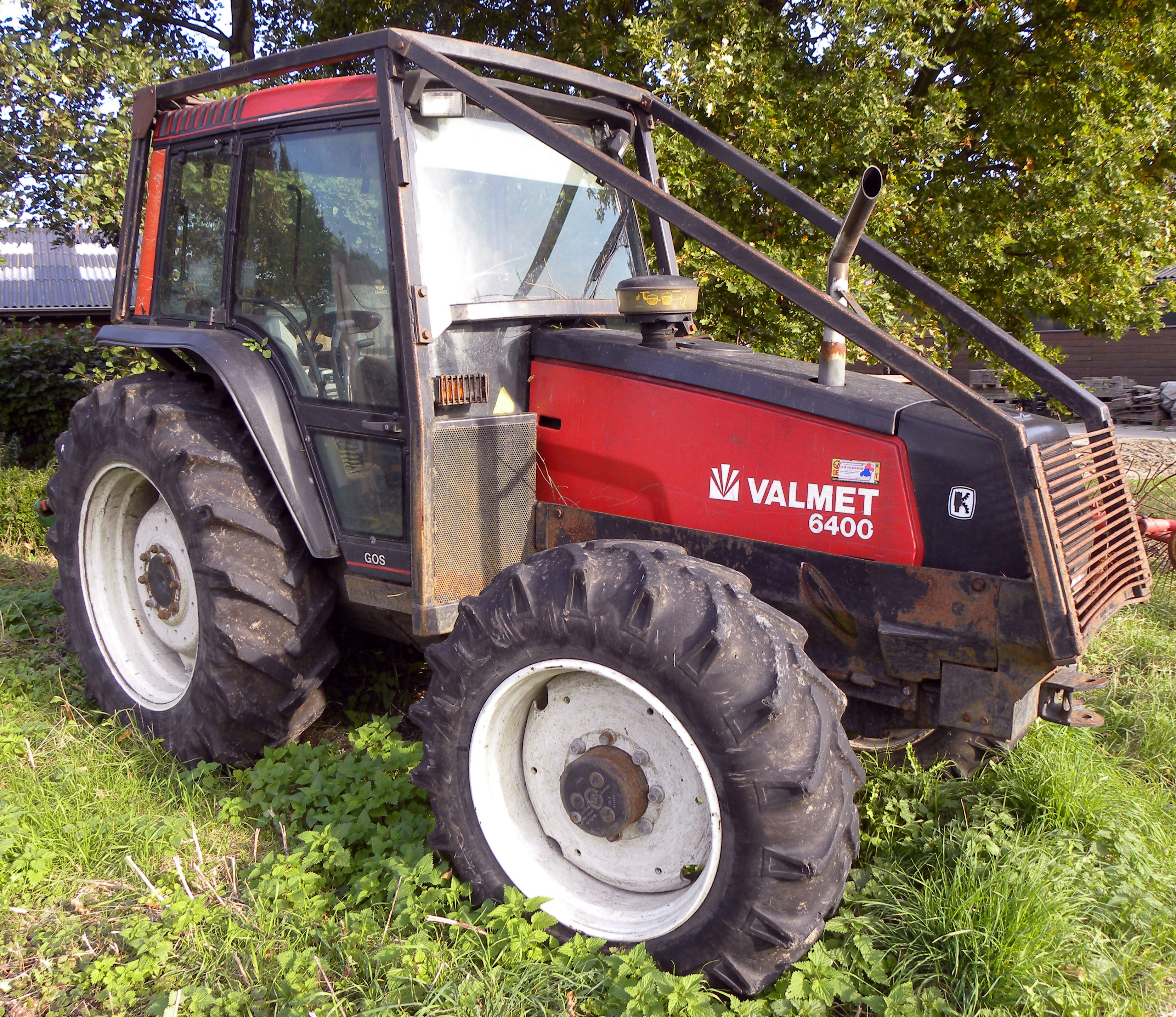 Valmet 6400